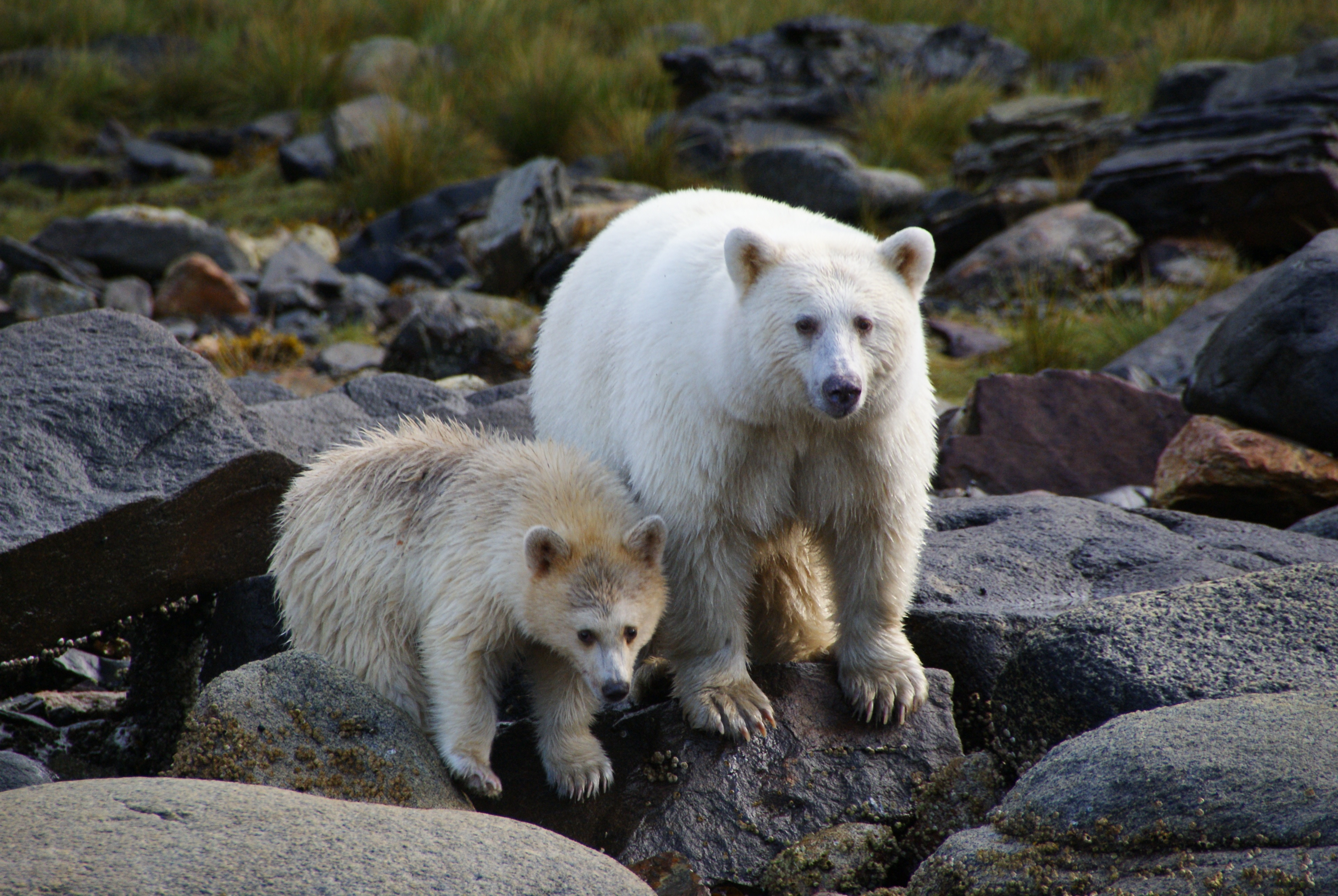 Ursus americanus kermodei, Spirit Bear Lodge, Klemtu, BC.